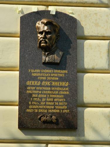 Пам’ятна дошка Левку Лук’яненку відкрита в м. Глиняни 2 вересня 2012